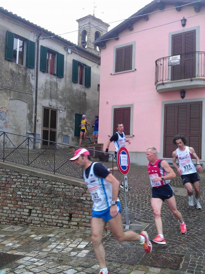 Passaggio della ColleMar-athon a Piagge